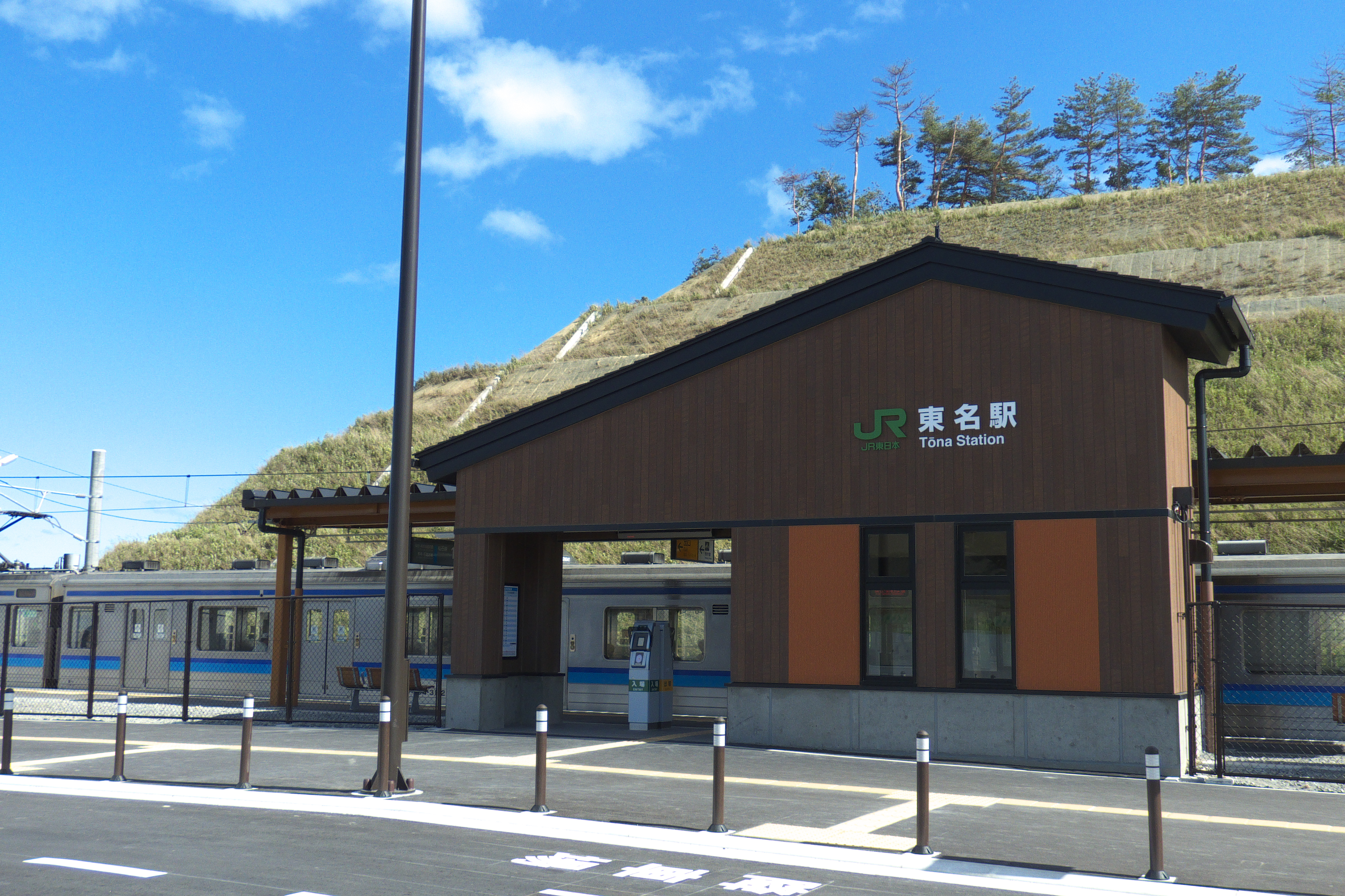 東名駅の駅舎(2015-06-04)